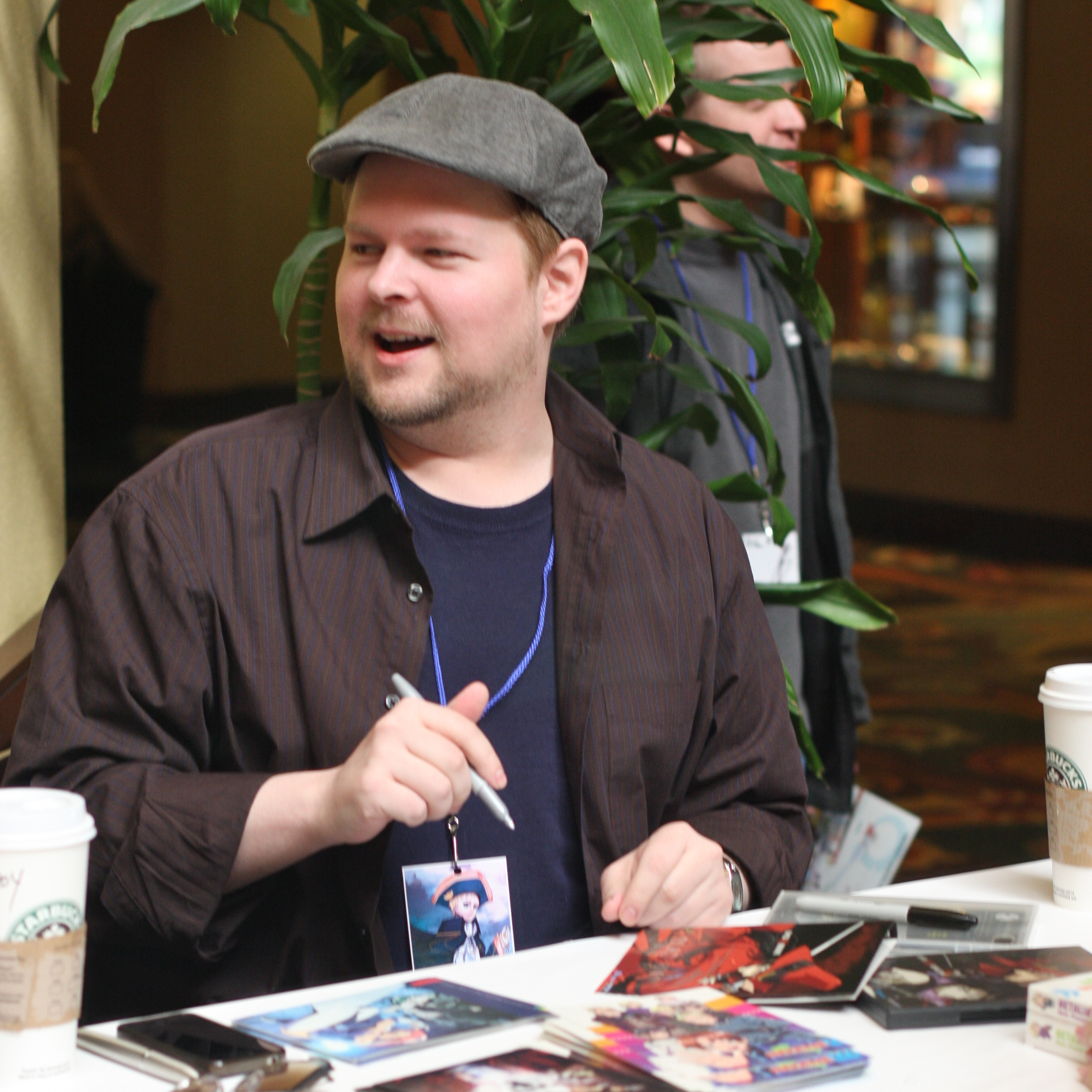 美國配音員Chris Cason出席Taiyoucon 2011。